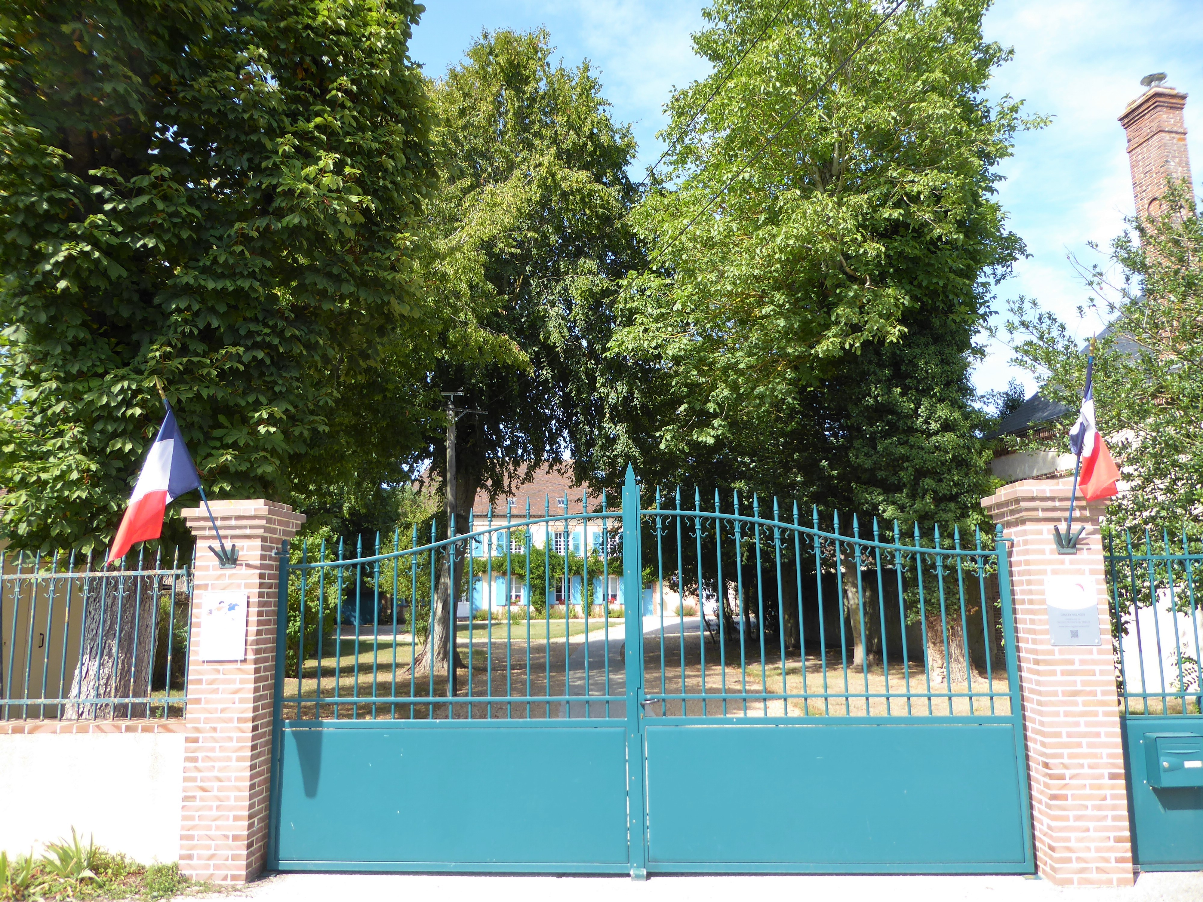 mairie de Crucey-Villages, Eure-et-Loir, France.